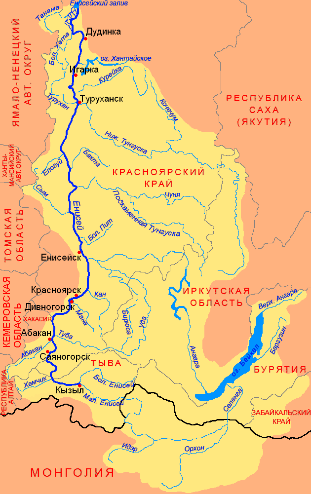 Схема бассейна реки Енисей